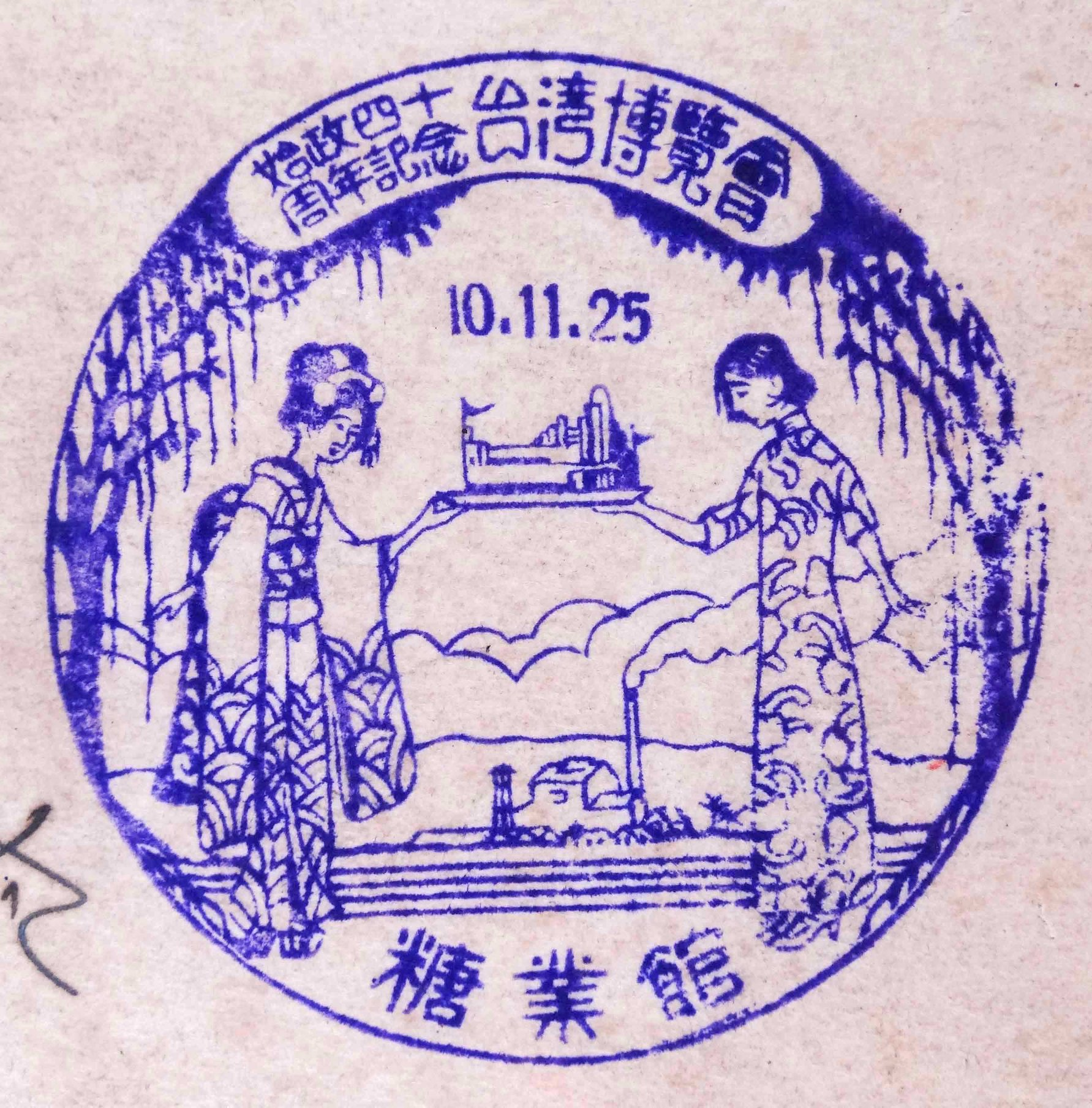 始政四十周年記念臺灣博覽會糖業館紀念戳章。